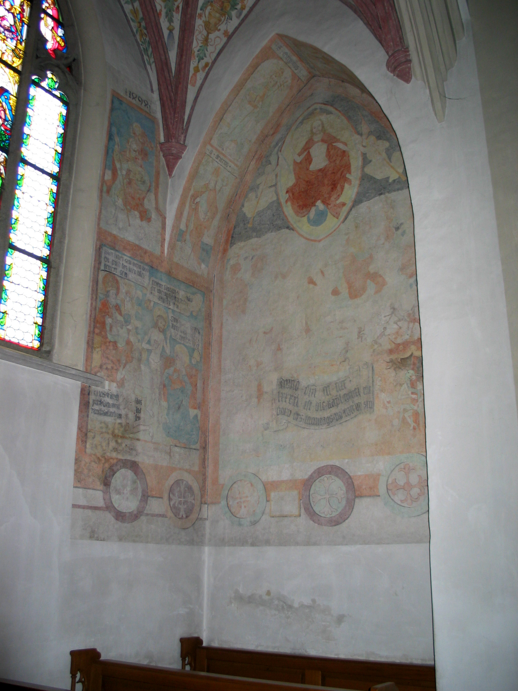 Dingolfing, Kath. Stadtpfarrkirche St. Johannes. Wandmalerei in der Kreuz- oder Tuchmacherkapelle (1482).